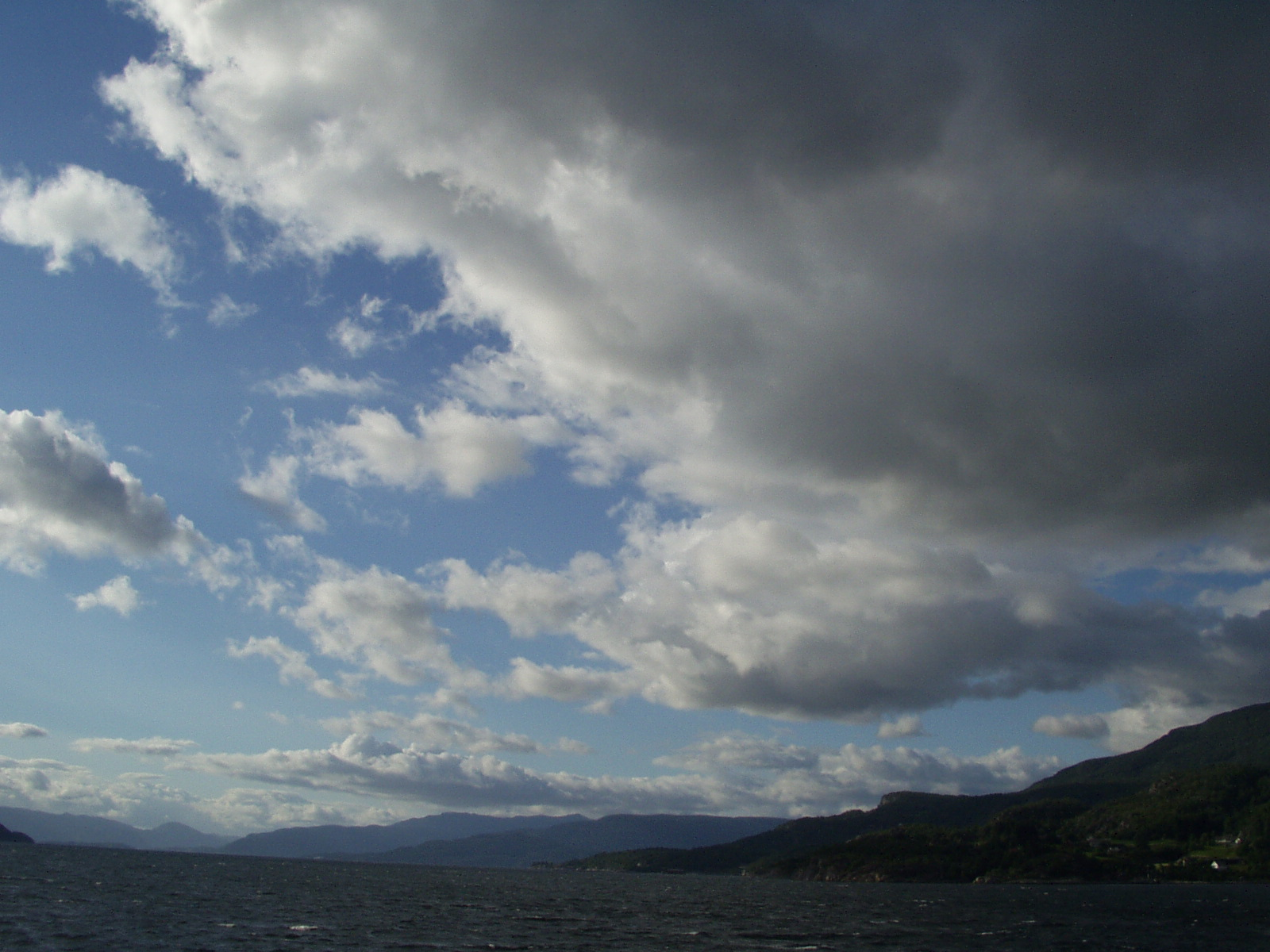 Oblaky (mraky) typu Cumulus mediocris, a Cumulus fractus nad Fjordom v Nórsku.